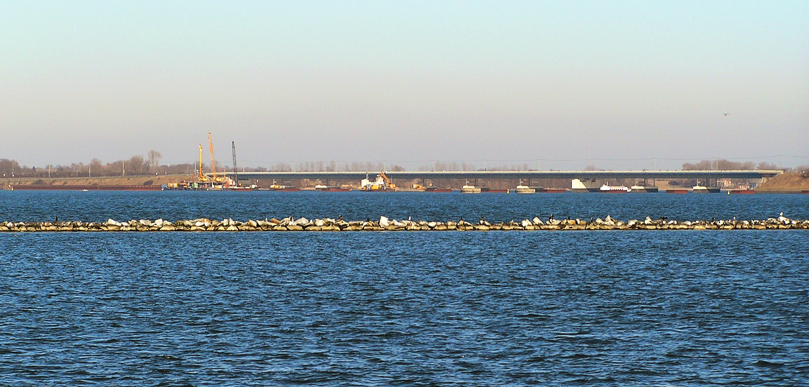 Beschreibung: Rügendammbrücke zw. dem Dänholm und Rügen erkennbar sind außerdem die Bauarbeiten an der Strelasundquerung Fotograf: Darkone, 31. März 2005